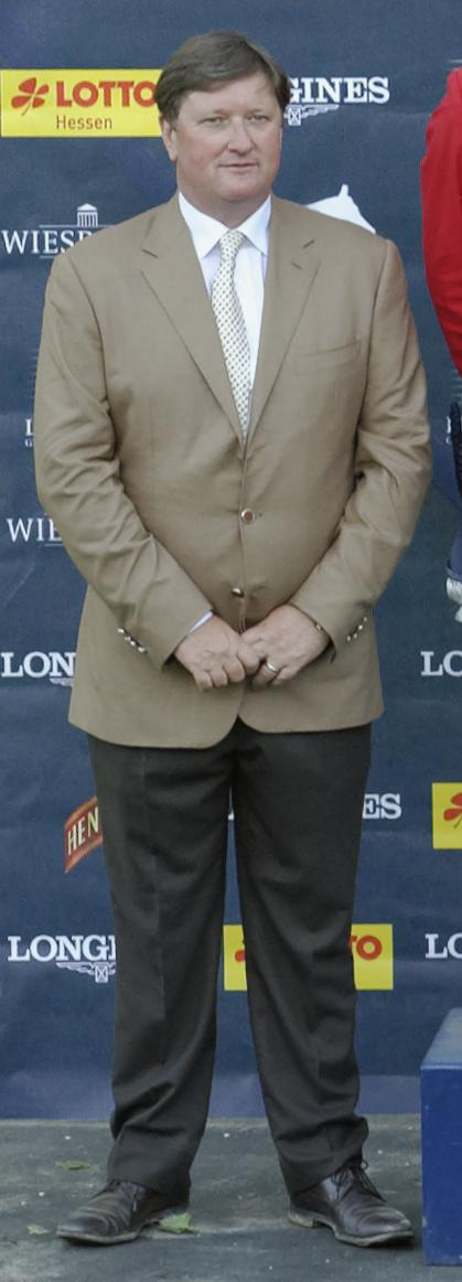 Jan Tops bei der Siegerehrung der Global Champions Tour in Wiesbaden 2013